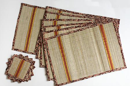 பத்தமடை பாய்